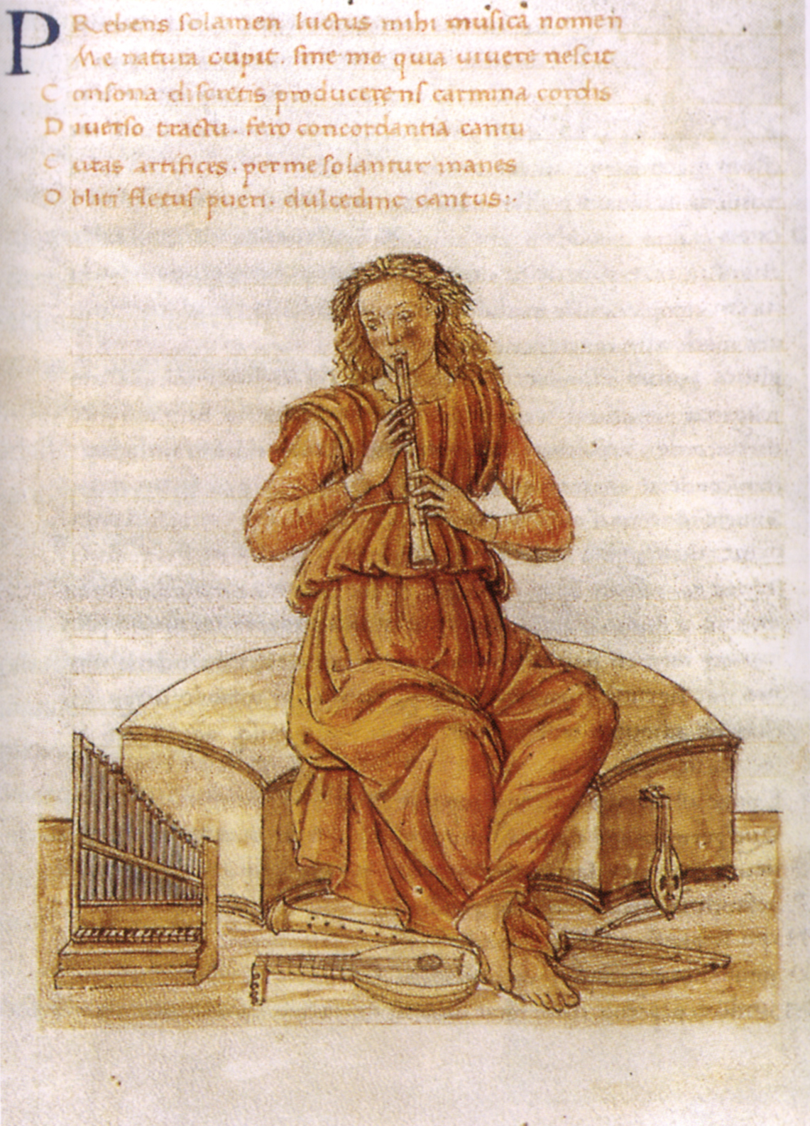 Gherardo di giovannid el fora, musica, in marziano capella de nuptiis philologiae et mercurii, ms. urb lat 329 f 149v bibl ap vat